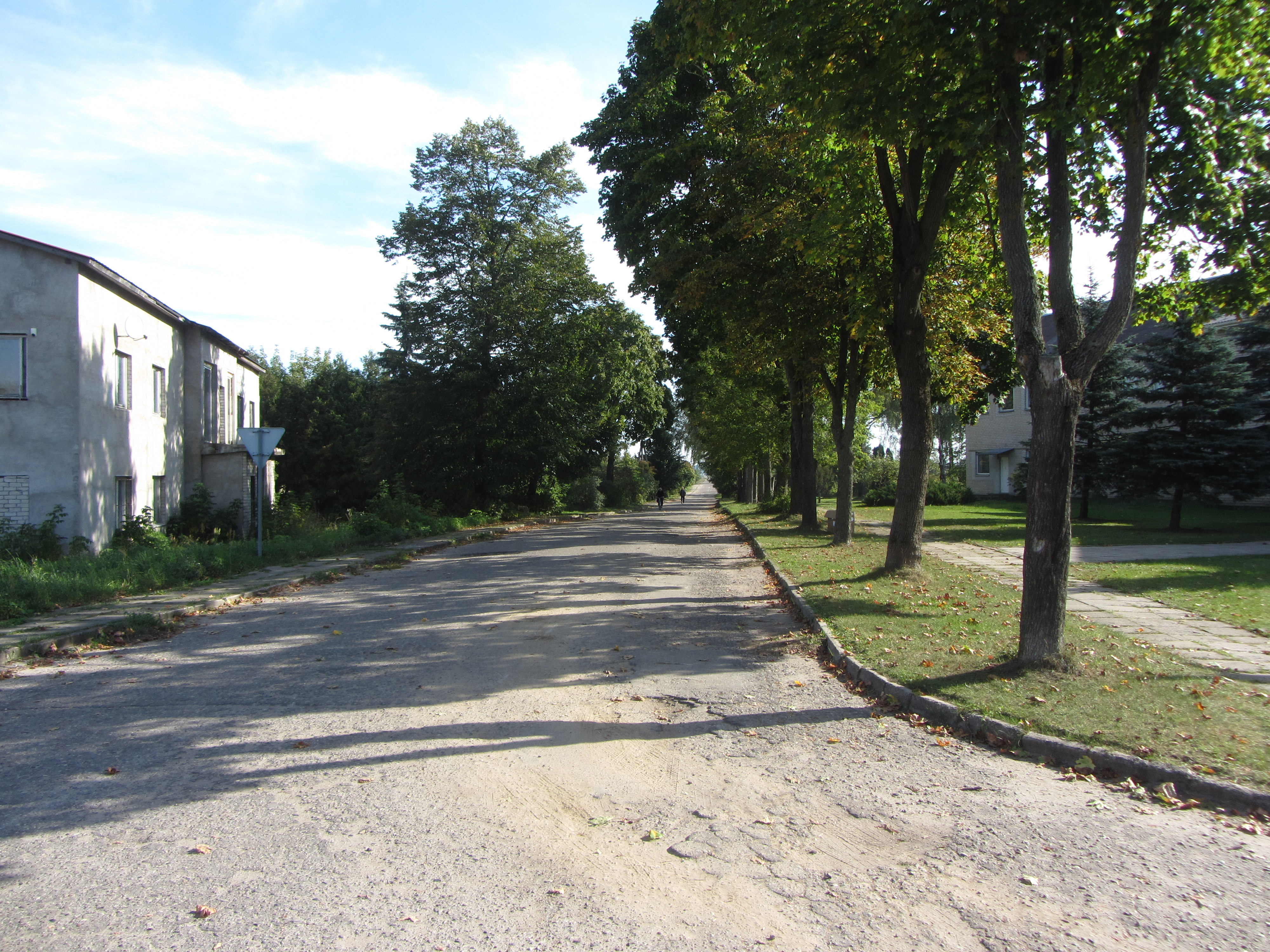 Gudžiai, Lithuania